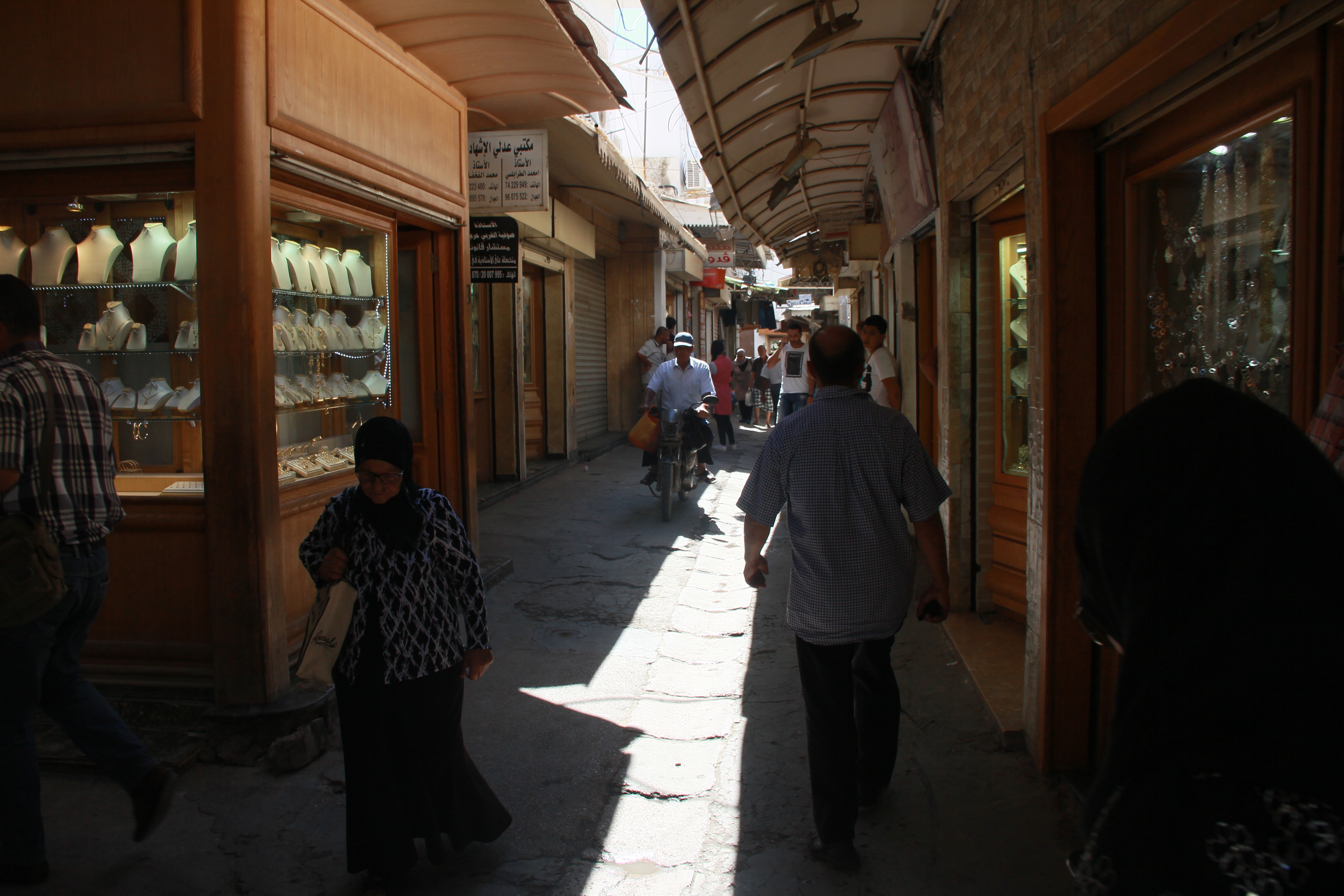 كان يوجد في صفاقس سوق للكمادين يقع في الجزء الجنوبي من نهج العدول و يربط بين رحبة الرماد و نهج سيدي علي الكراي و بيه قيصرية العشر التي كانت تسمى قيصرية العيادي